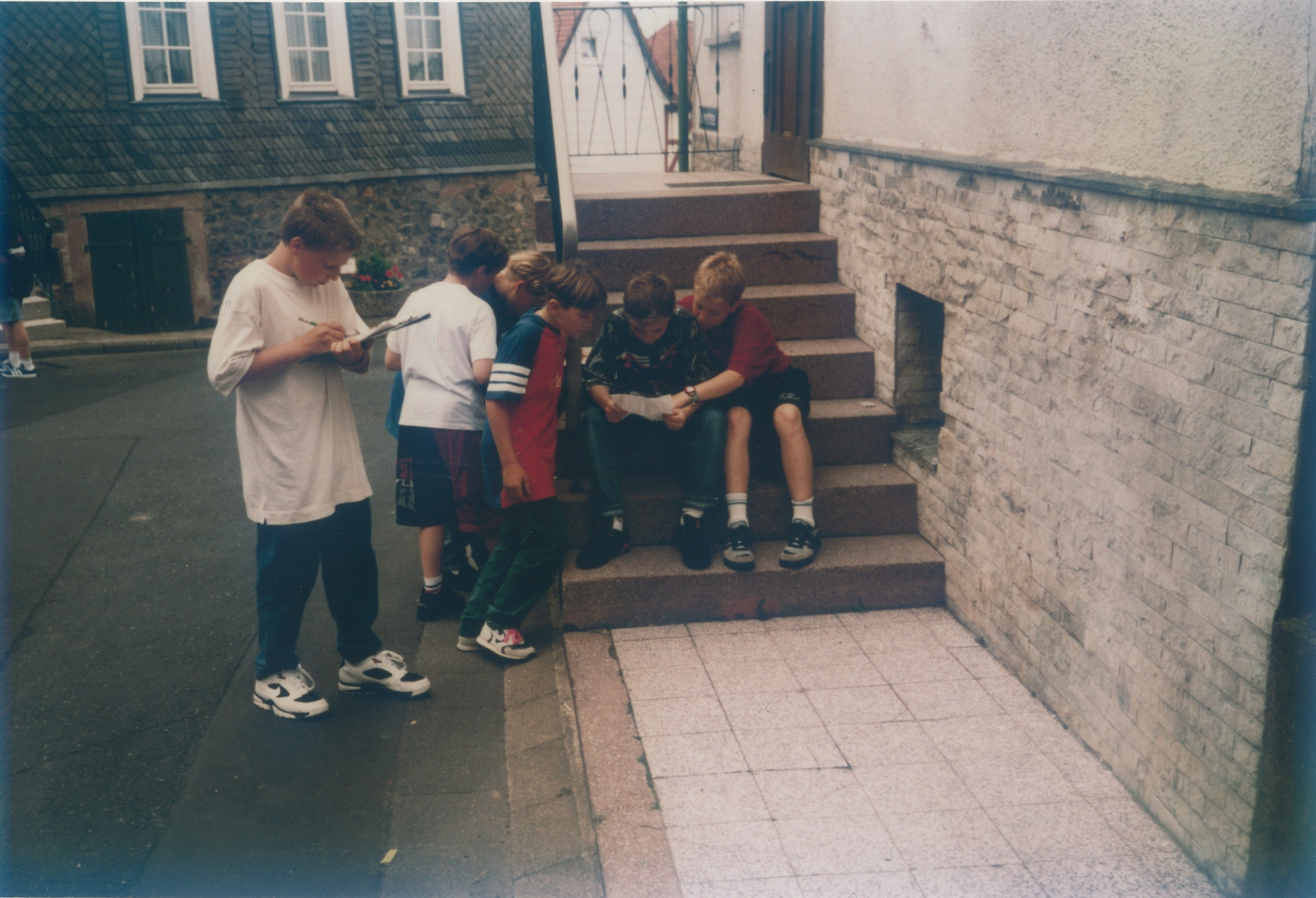 Schüler einer 6. Klasse der Stiftsschule St. Johann zu Amöneburg bei einer geologischen Stadtexkursion; Bild aus dem auf Martin Wagenschein basierenden Lehrstücks "Wettersteine" (1997)